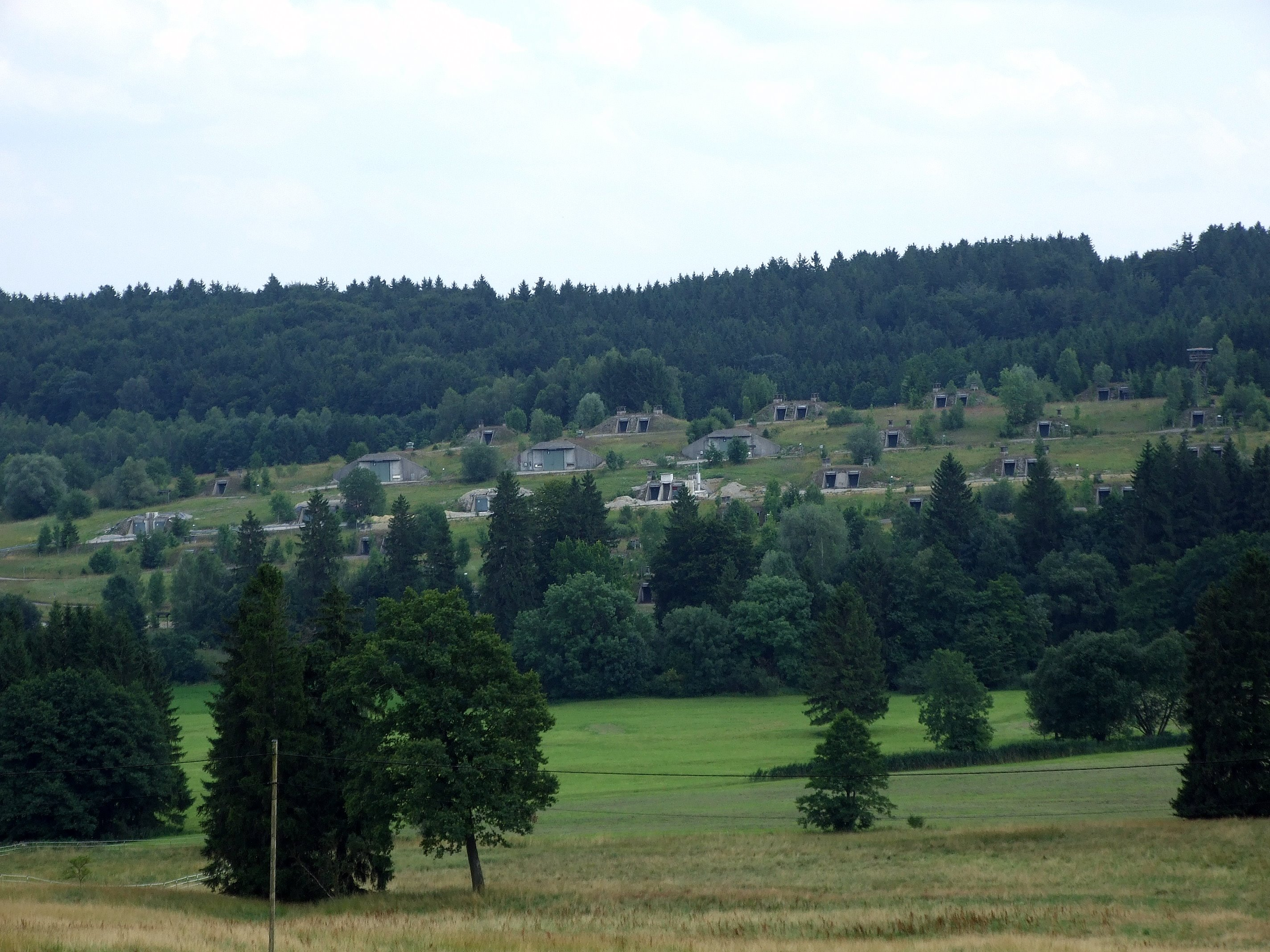 Ehemaliges Munitionslager Engratshofen, Gemeinde Fuchstal, Bayern von der Verbindungsstraße Engratshofen/Stockberg aus fotografiert.